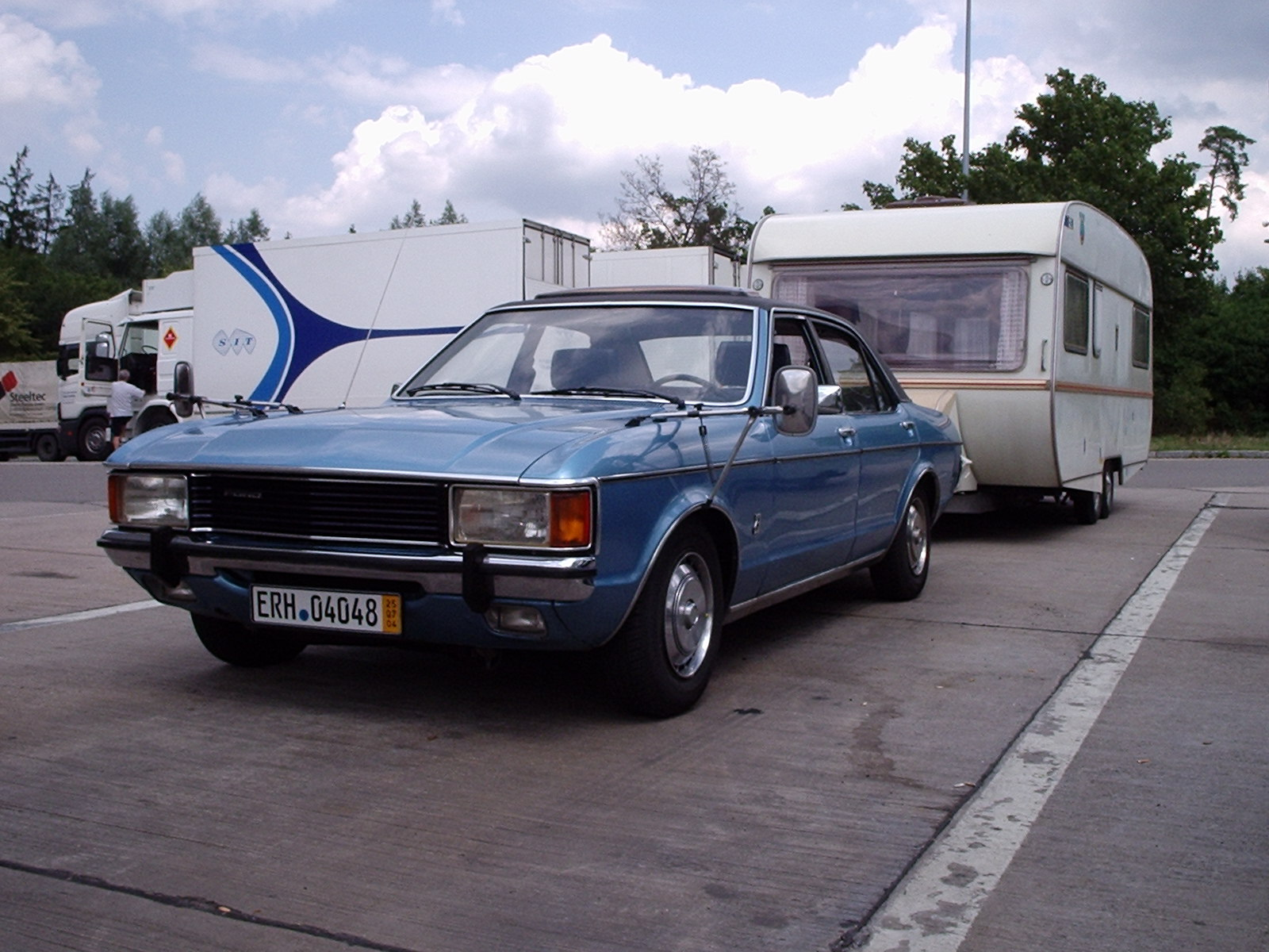 Ford Granada 2,3GL, Modell 1975, eigener Wagen, GNU-FDL